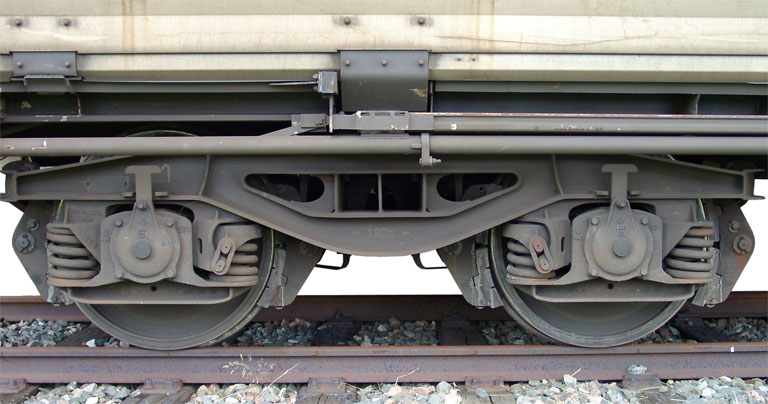 Drehgestell des Typs Y25 geschweißt mit 22,5-t-Radsätzen. Y25 ist das häufigste Güterwagen-Drehgestell.